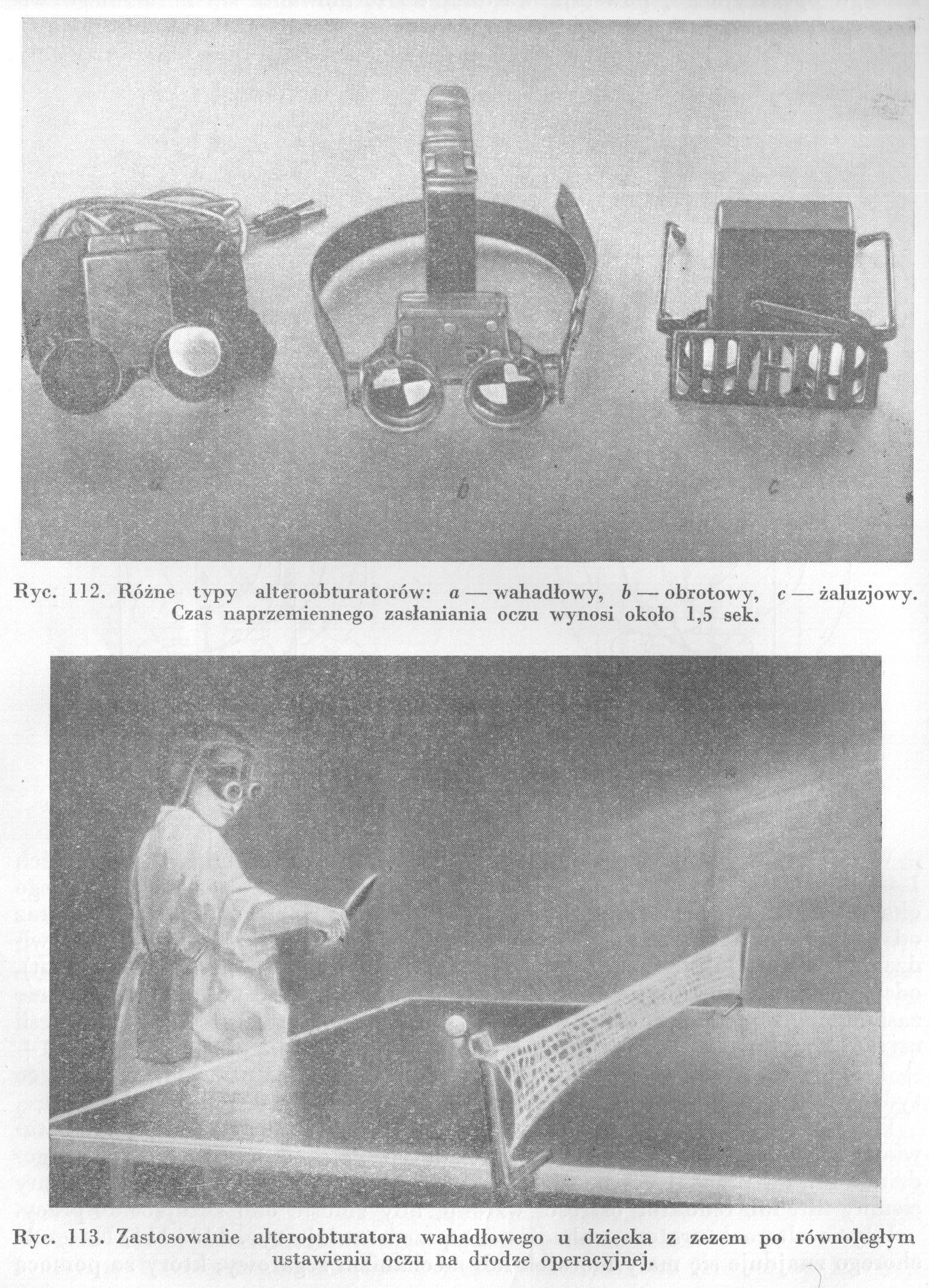 Typy alteroopturatorów, stosowanych w Klinice Okulistycznej PAM w Szczecinie przed rokiem 1969